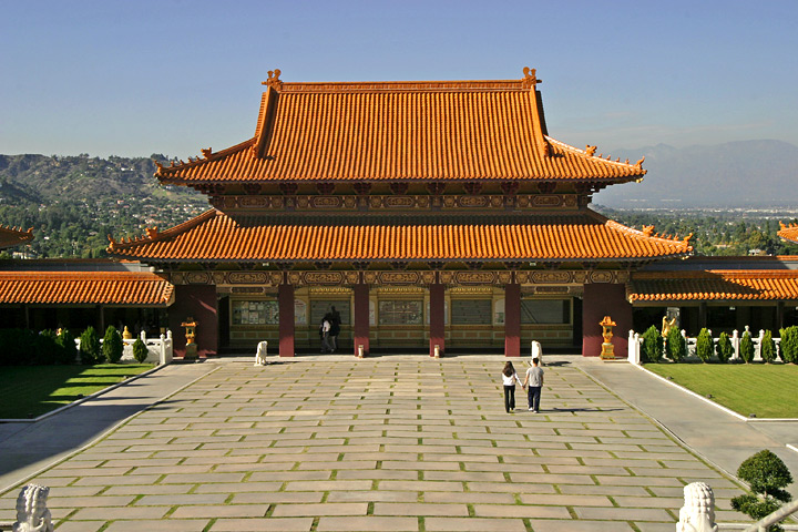 Hsi Lai Temple